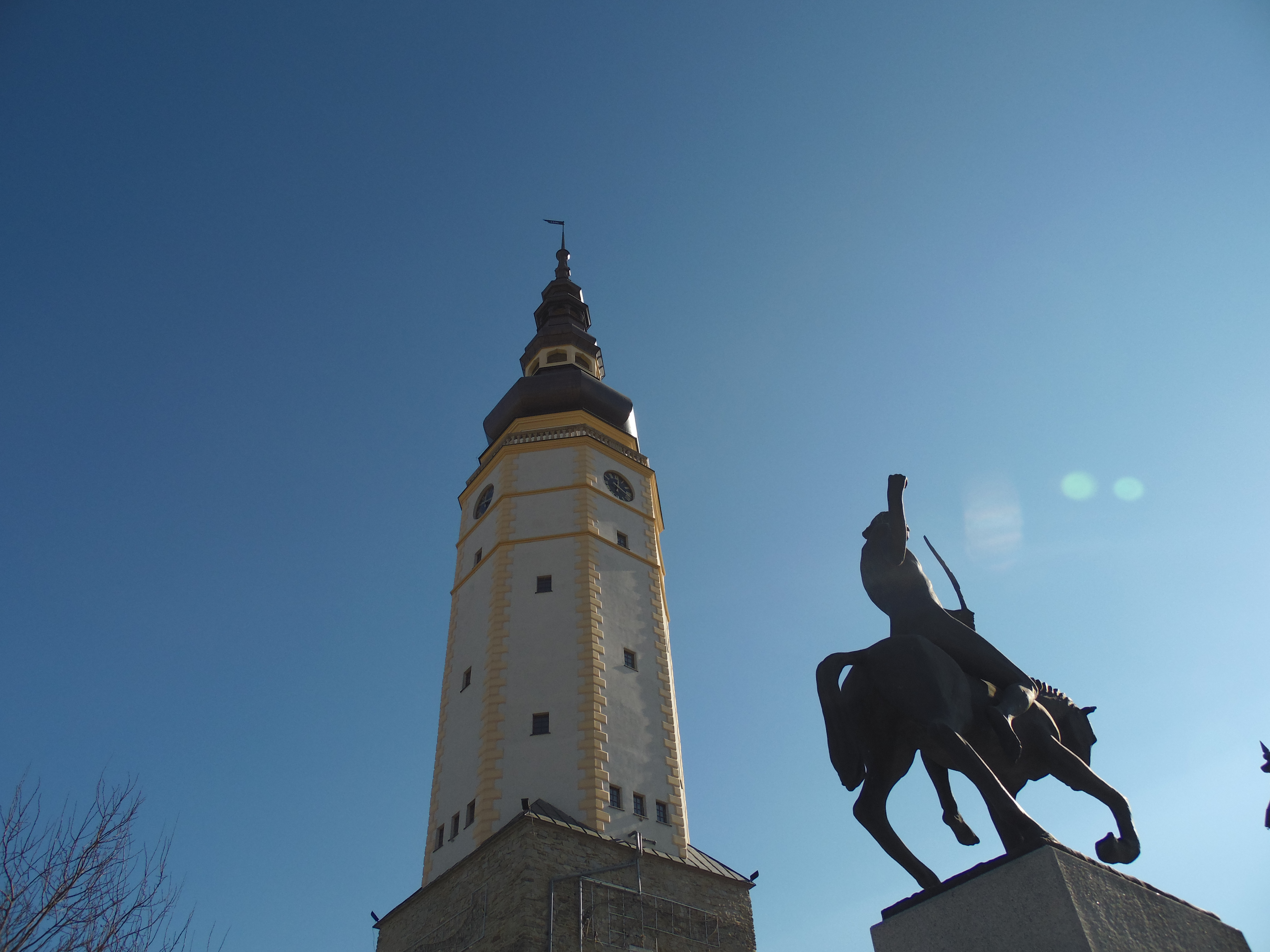 Wieża Strzelińskiego ratusza po odbudowie